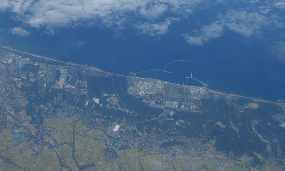 柏崎刈羽原子力発電所が見えました。 (2006/09/10 In Flight, NH704, JAPAN)